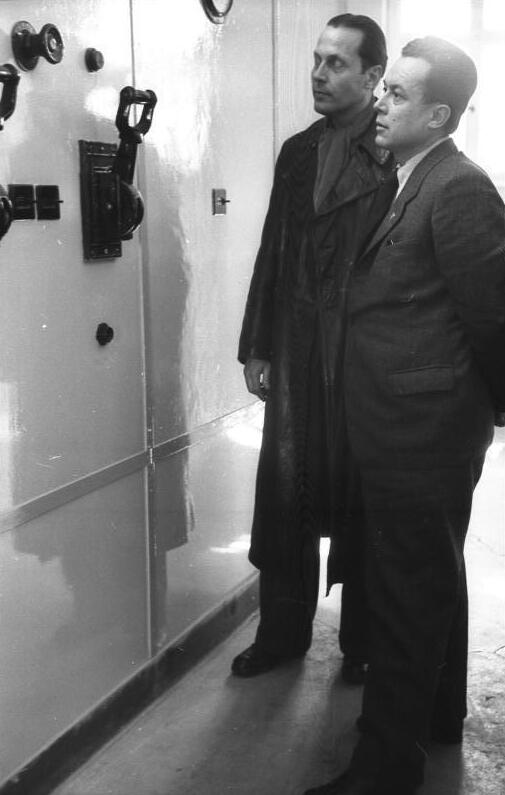 Die Stimme Berlins wieder auf voller Lautstärke. (Die neue Sendeanlage des Berliner Rundfunks in Königswusterhausen) Die barbarische Sprengung der Sendeanlage des Berliner Rundfunks durch die französische Militärbehörde am 20. Dezember 1948 sollte die Stimme der Wahrheit zum Verstummen bringen. Doch in engster Zusammenarbeit der technischen Intelligenz mit der Arbeiterschaft konnte die Sendeanlage in einer Rekordzeit von 2 1/2 Monaten in Königswusterhausen neu errichtet werden. Seit dem 20.3.49 sendet der Berliner Rundfunk wieder mit voller Lautstärke. UBz: Chefingenieur Möhring und Intendant Girnus vom Berliner Rundfunk vor der Schalttafel des neuen Senders. Aufn.: Illus/Heilig 2984-49 24.3.49